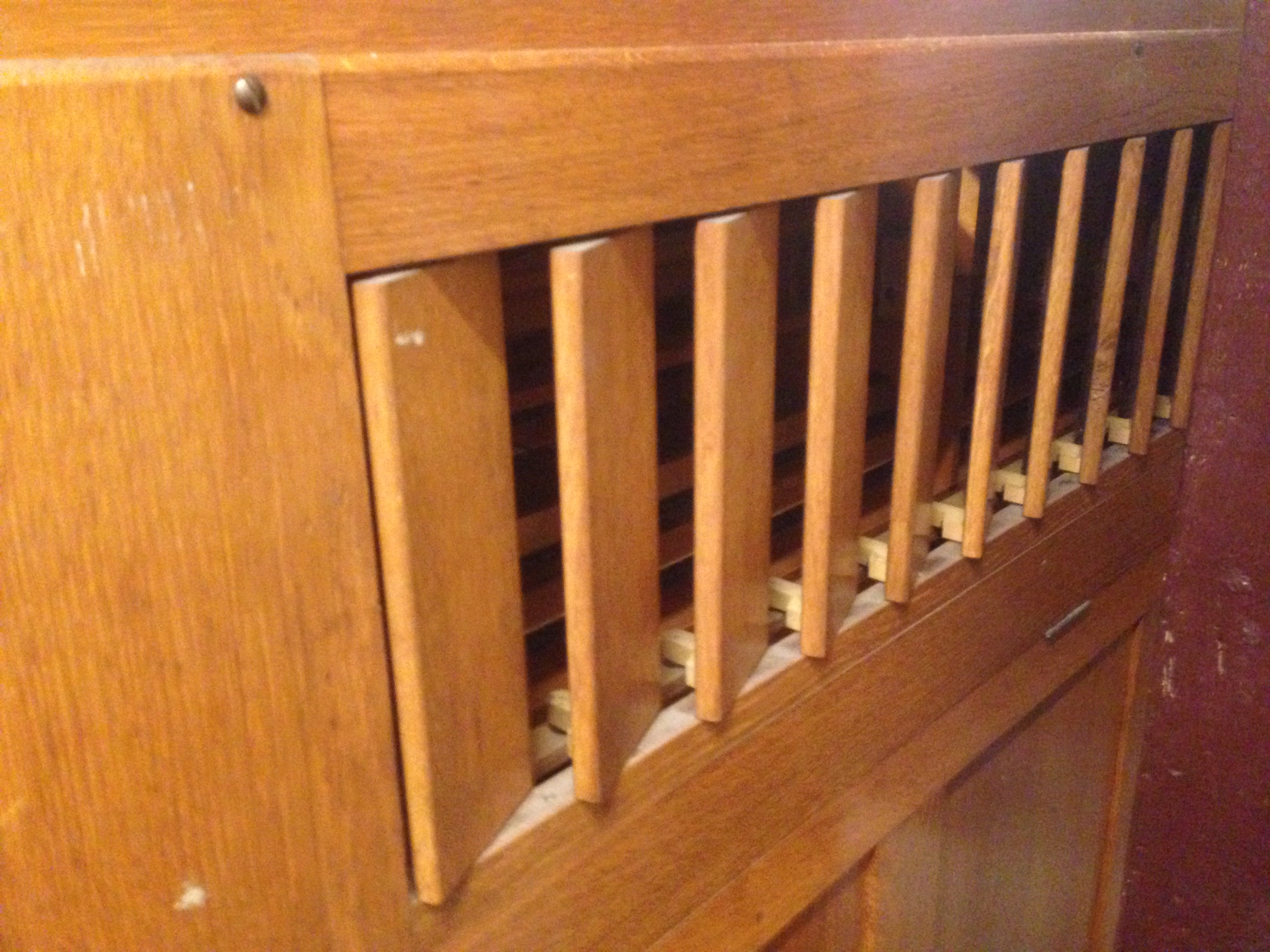 Harmonium Museum in Paasloo, Overijssel, Netherlands